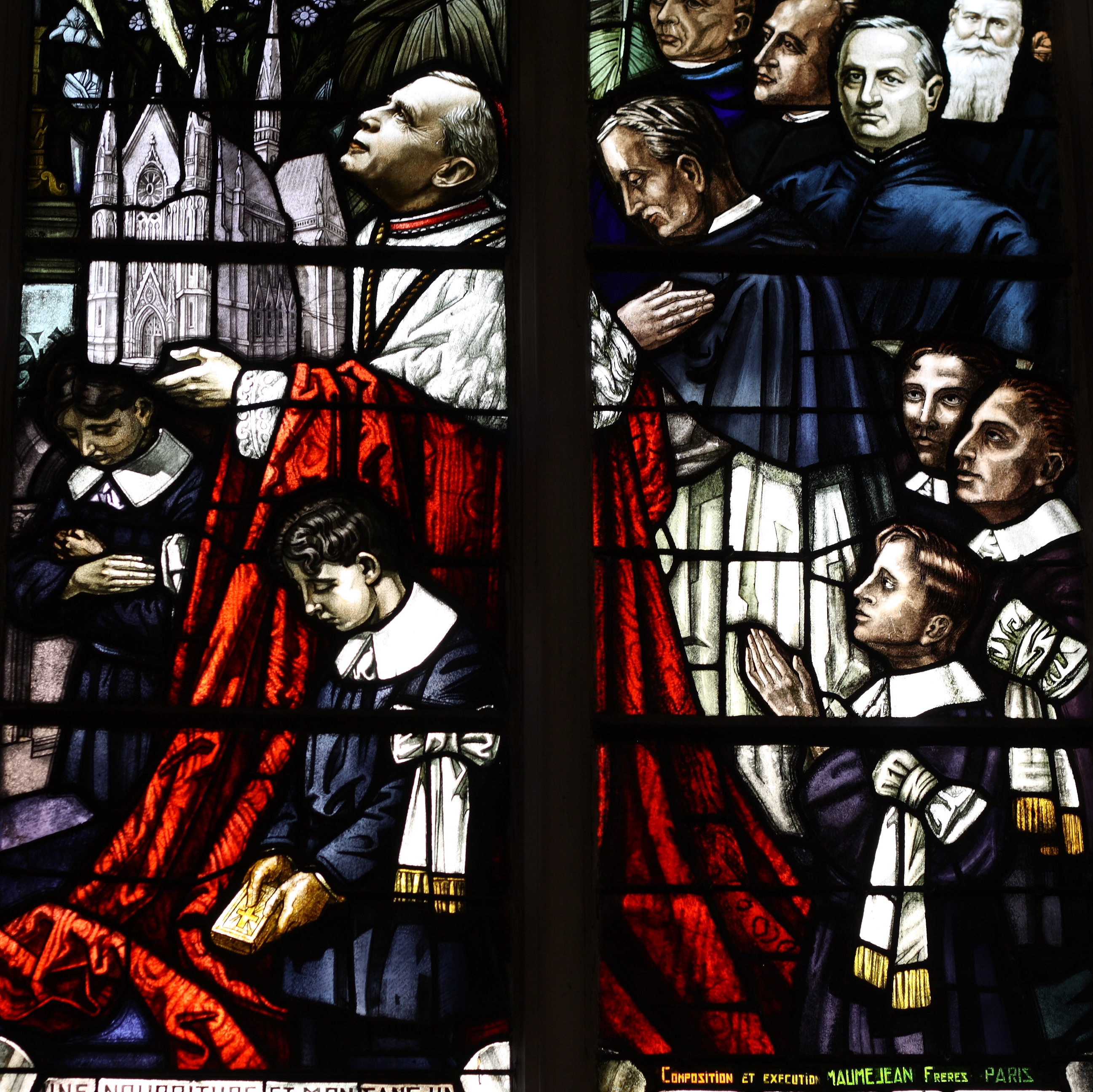 Bleiglasfenster (Ausschnitt) im linken Querhaus der Kapelle Sainte-Thérèse in Paris (40, rue La Fontaine, 16. Arrondissement), Darstellung: Kardinal Jean Verdier überreicht Maria ein Modell der neu errichteten Kirche, rechts oben mit langem Bart: Daniel Brottier (Geistlicher des Waisenhauses in Auteuil/Paris)